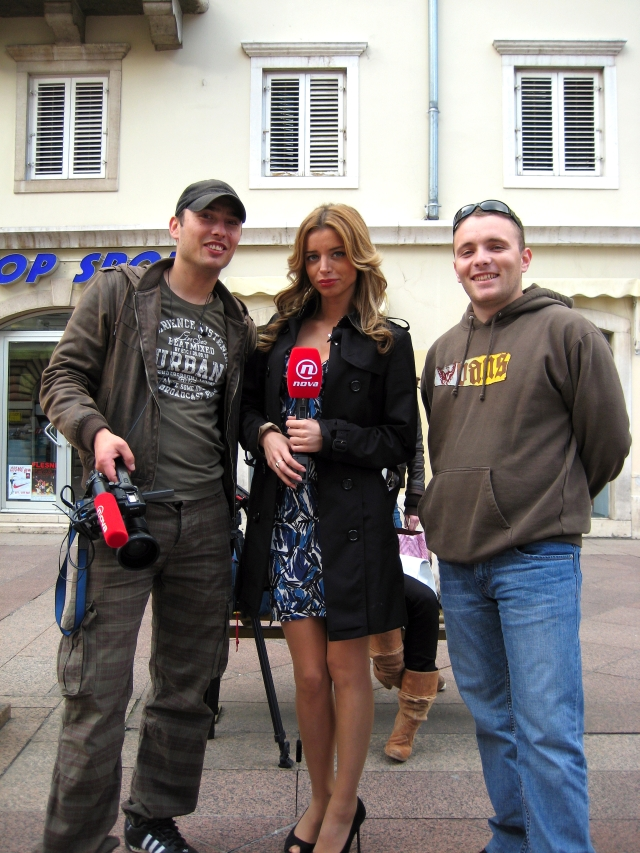 Novinarsko snimateljska ekipa Nove TV u Rijeci